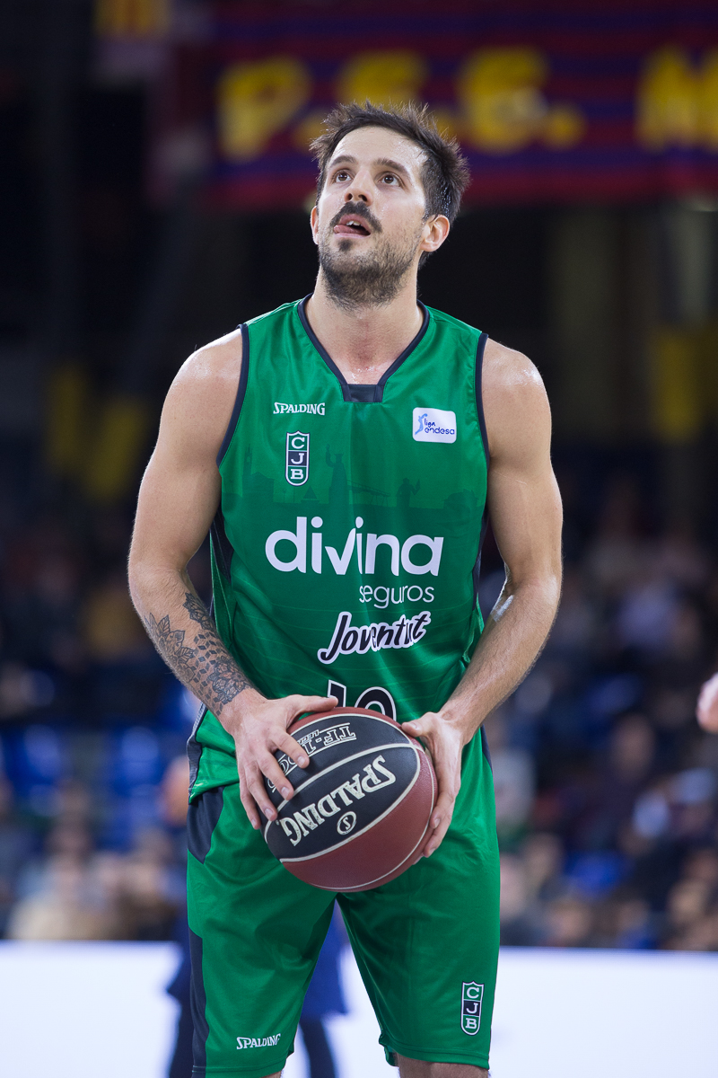 Nicolás Laprovittola, jugador del Joventut de Badalona, en un partido de la temporada 2017-18